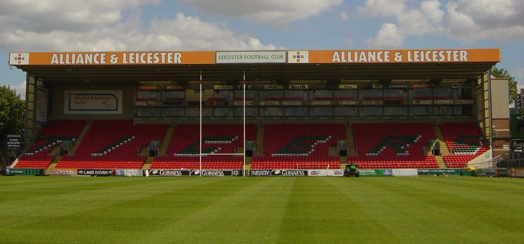 Welford Road Stadium, Leicester (Angleterre).